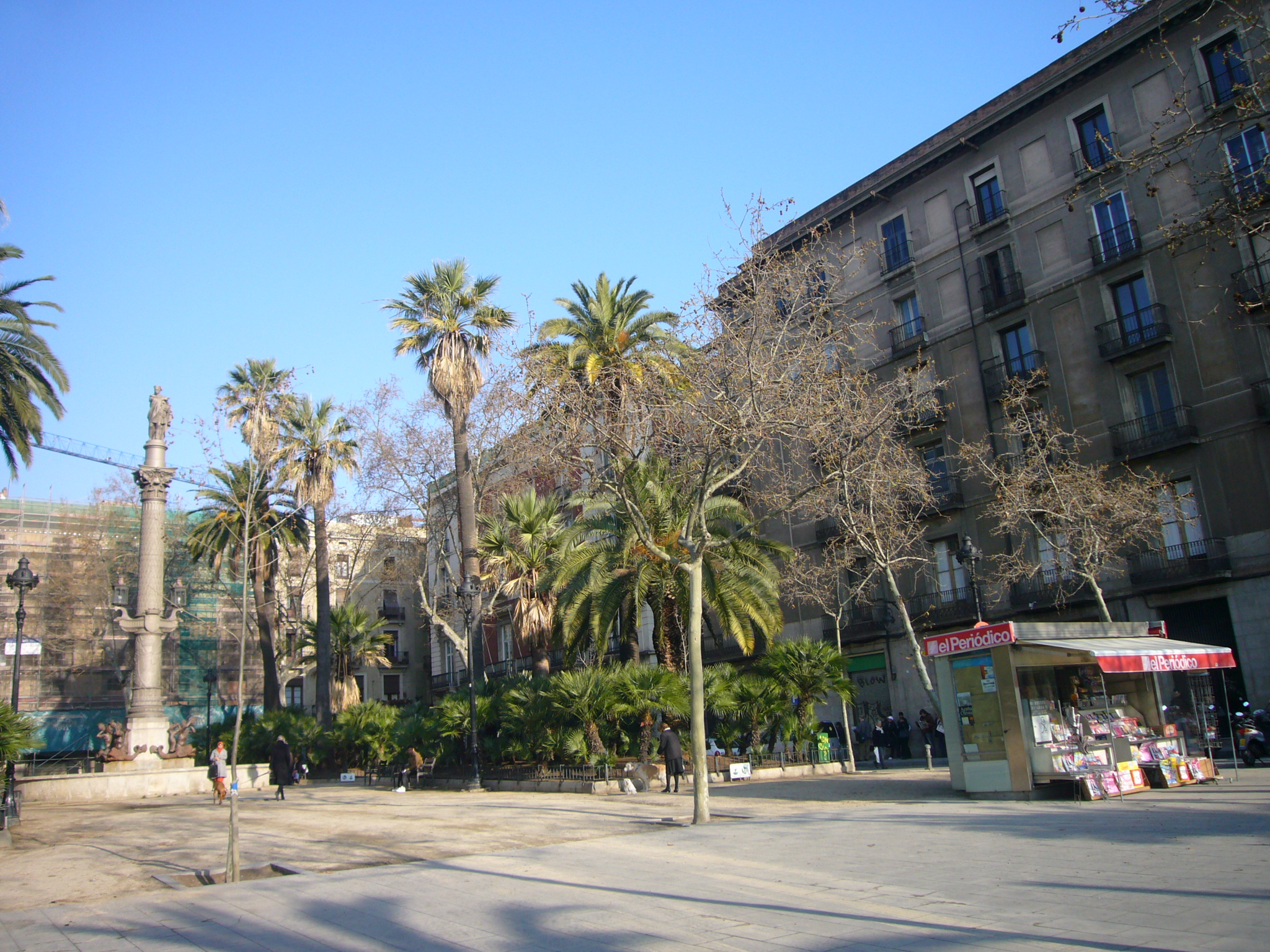 Plaça Duc de Medinaceli